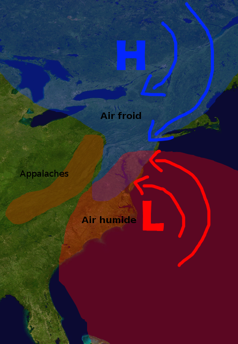 Author: Kyle Griffin et Miguel Tremblay Date: February 25th 2007 Source: Image originale créée par WindRunner et versée dans le domaine public. Texte traduit en français par Miguel Tremblay et image reversée dans le domaine public. Description: Exemple d'effet de blocage d'air froir au-dessus des États-Unis. Une zone de haute pression couvre une partie de l'est du Canada et canalise l'air froid le long de la côte dans ce qui deviendra un système de tempête, créant ainsi une probable grosse tempête de neige.